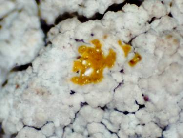 Lepraria lobificans